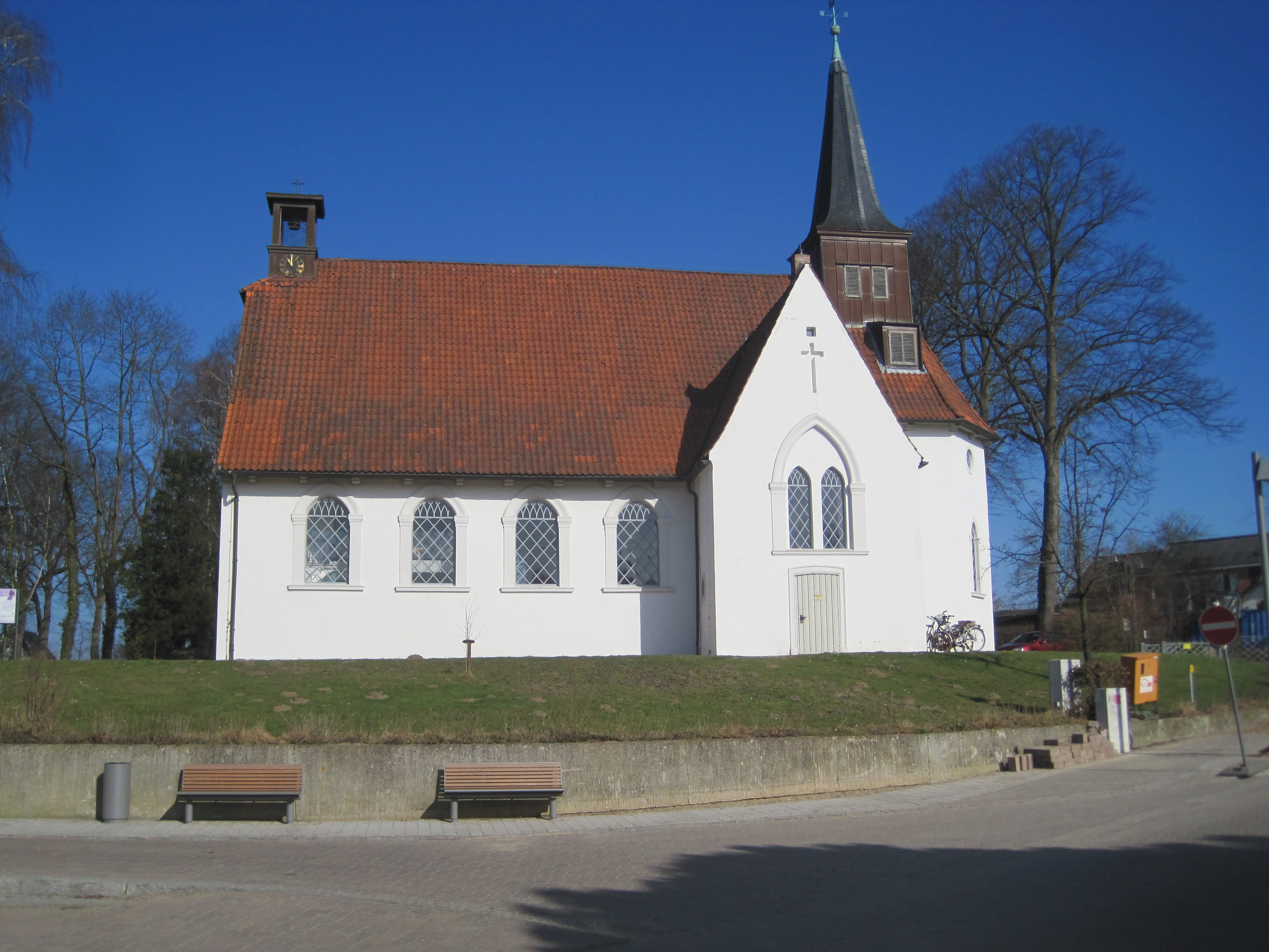 Matthias-Claudius-Kirche in Reinfeld in Holstein von Süden